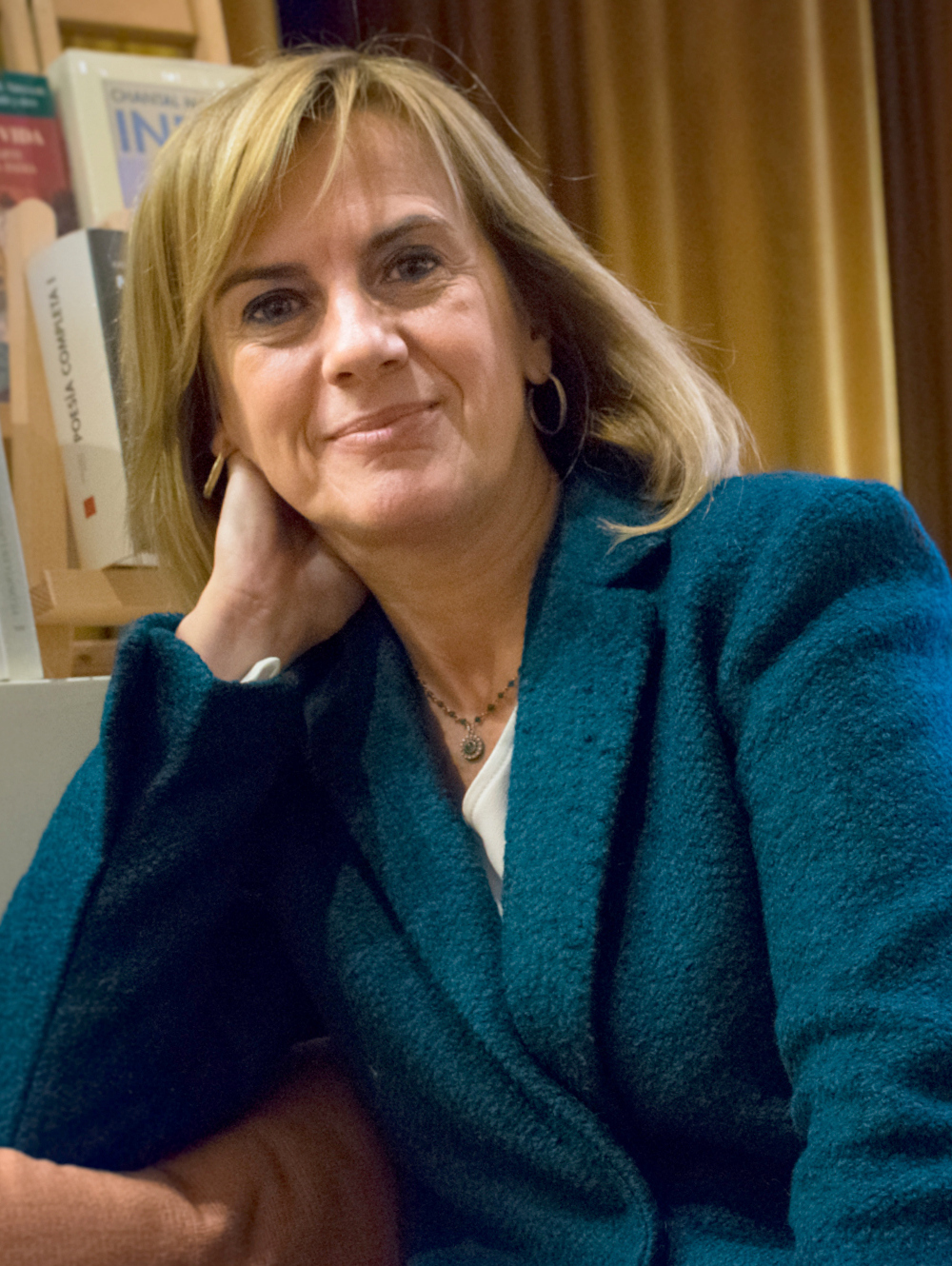 Gemma Nierga en la librería Nollegiu